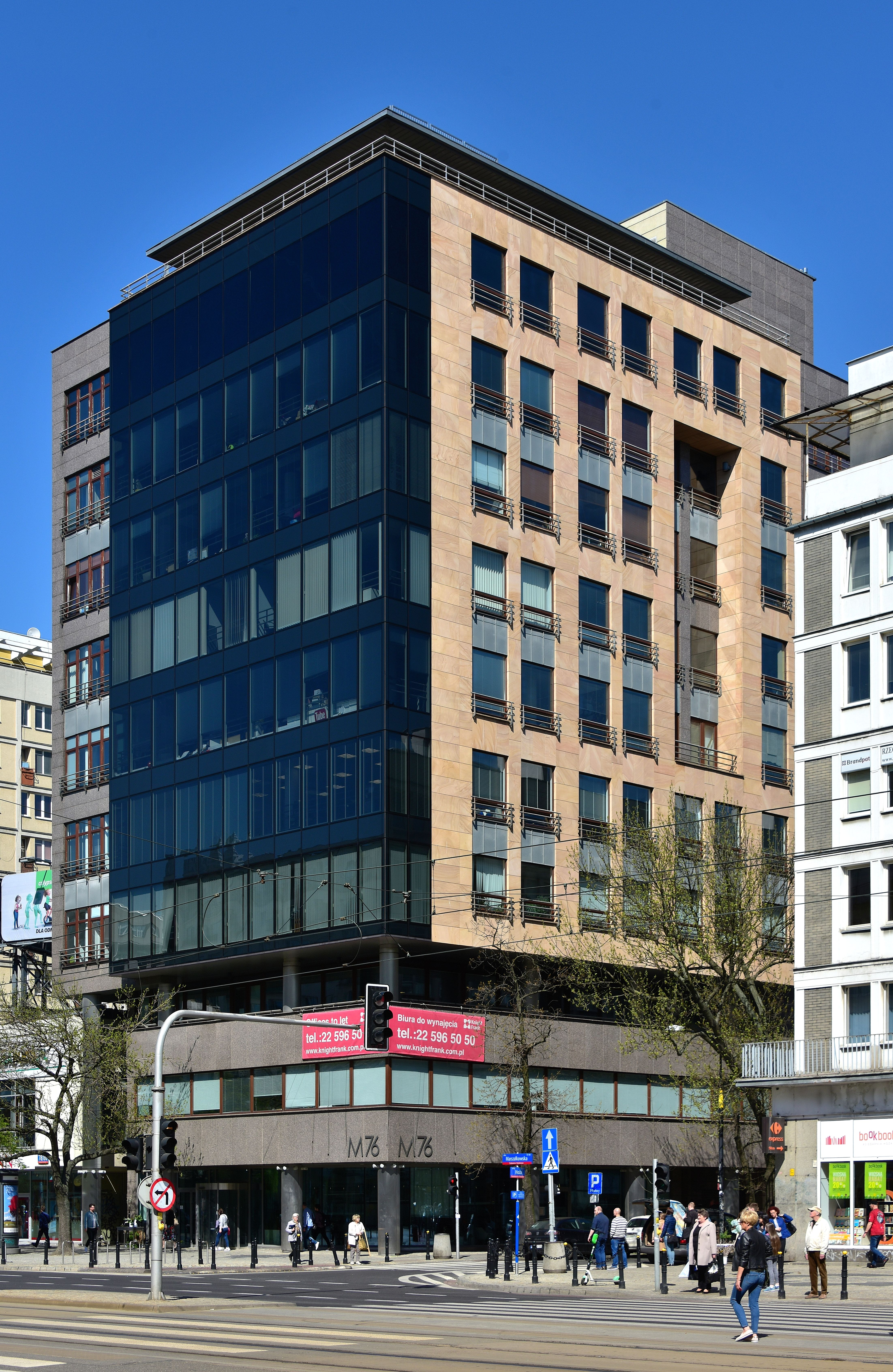 Biurowiec M76 przy ul. Marszałkowskiej 76 w Warszawie